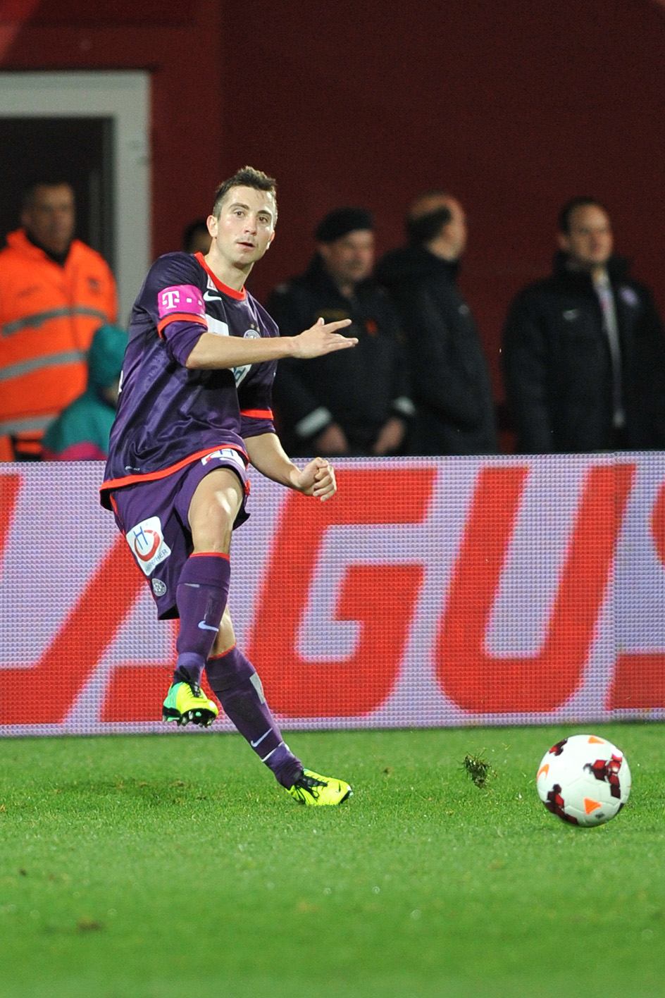 Bundesliga:FK Austria Wien - RZ Pellets WAC Markus Suttner